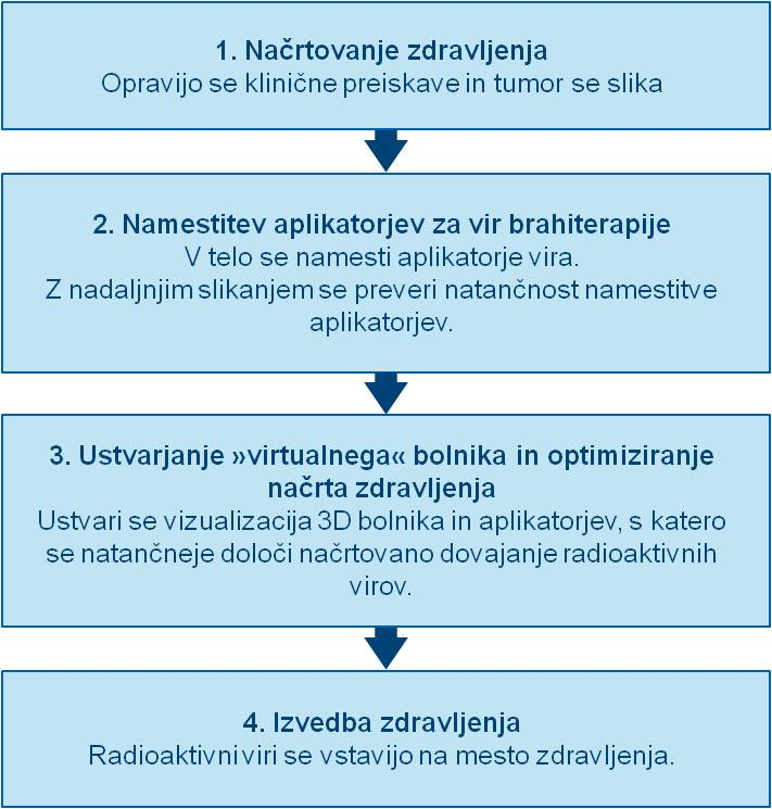 Običajni koraki postopka brahiterapije